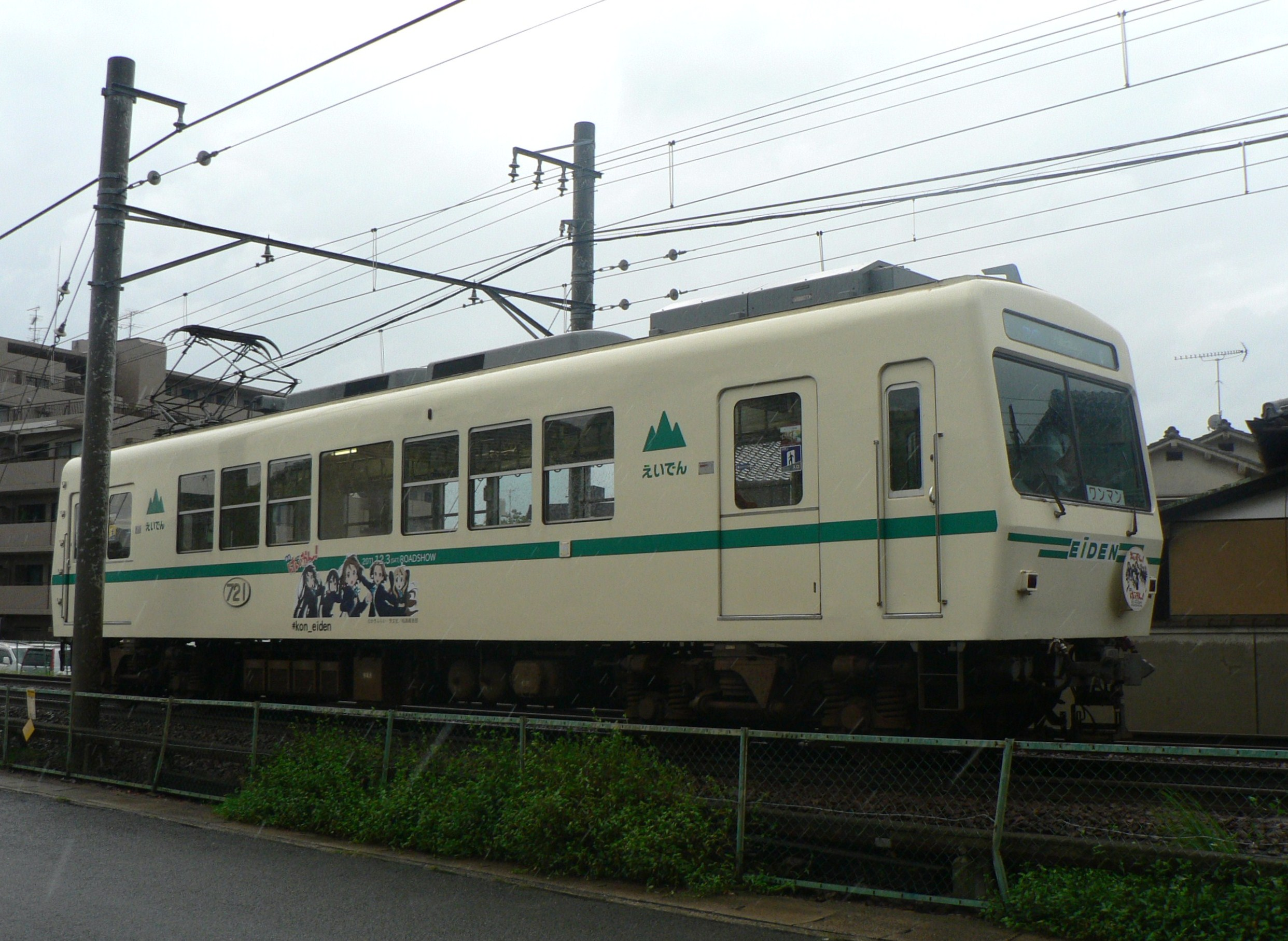 修学院車庫から出庫した映画けいおん!ラッピングを施されたデオ721号車。